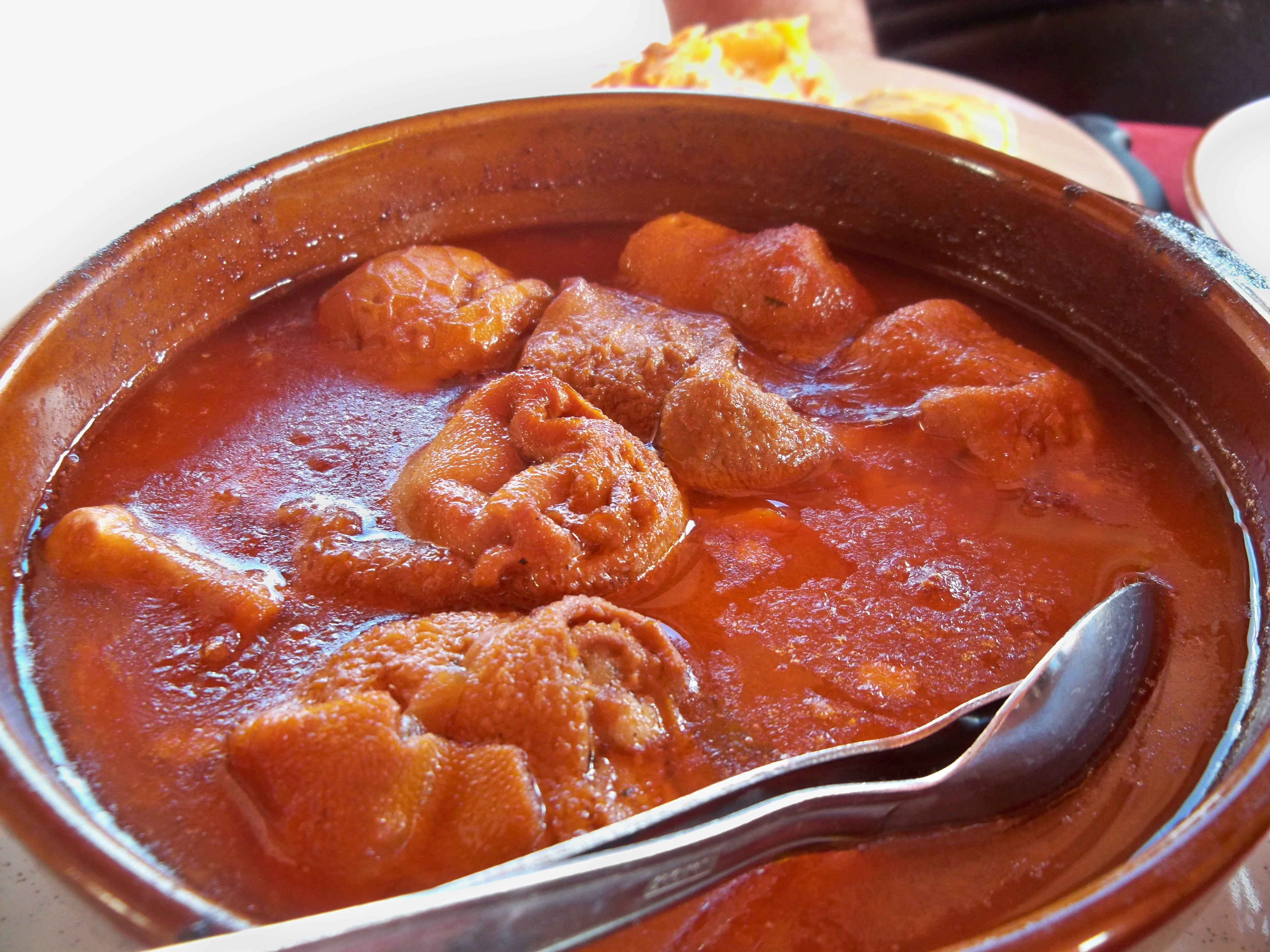 Défarde